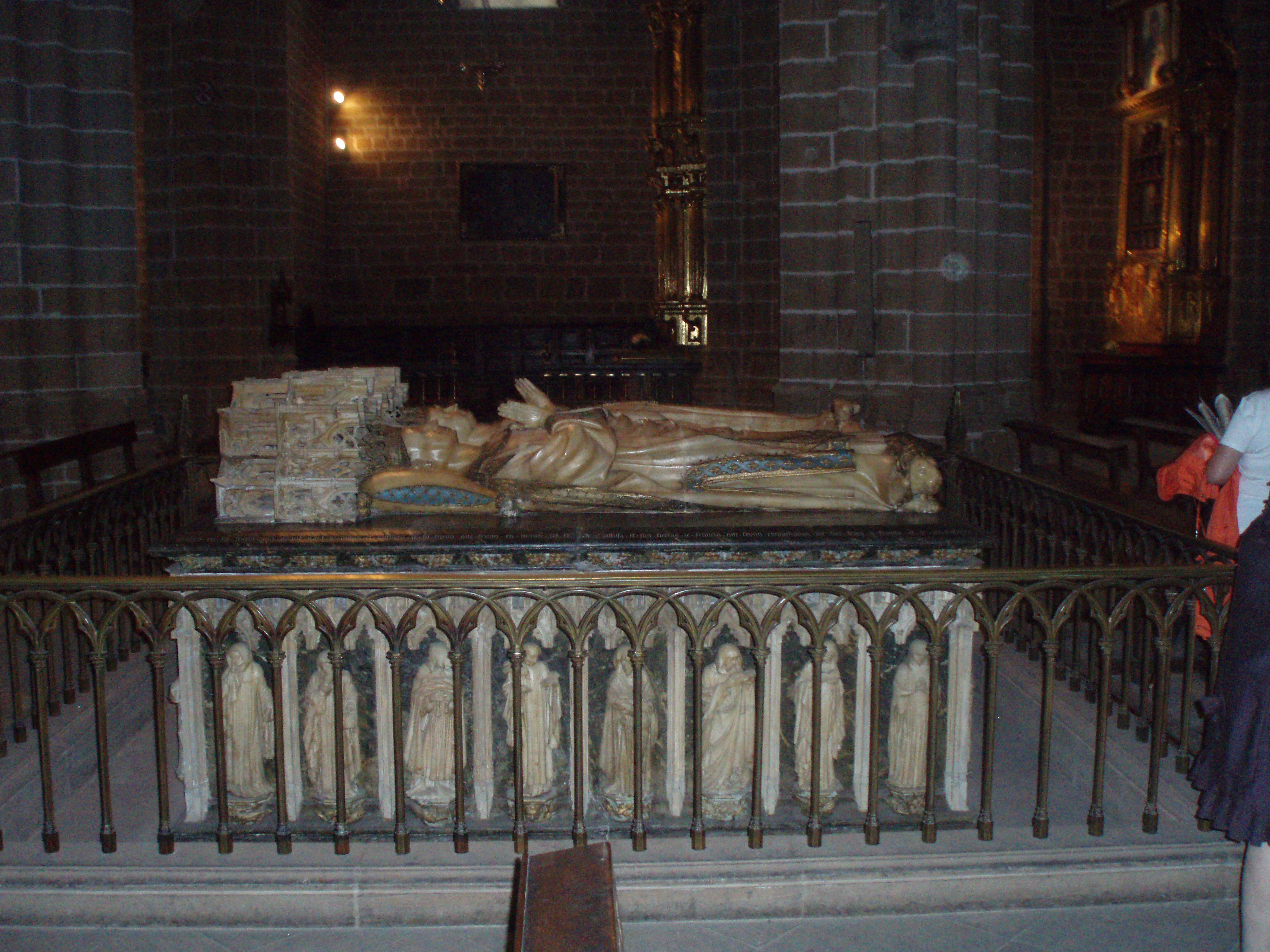 Sepulcro de Carlos III de Navarra. Catedral de Pamplona. Navarra, (España).